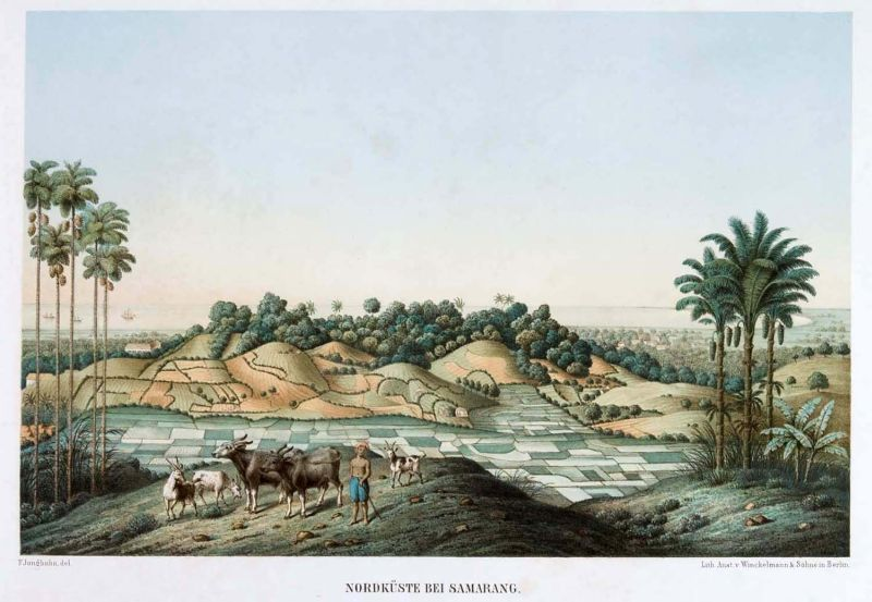 Litho. Litho naar een oorspronkelijk werk van F. Junghuhn.. De noordelijke kust bij Semarang